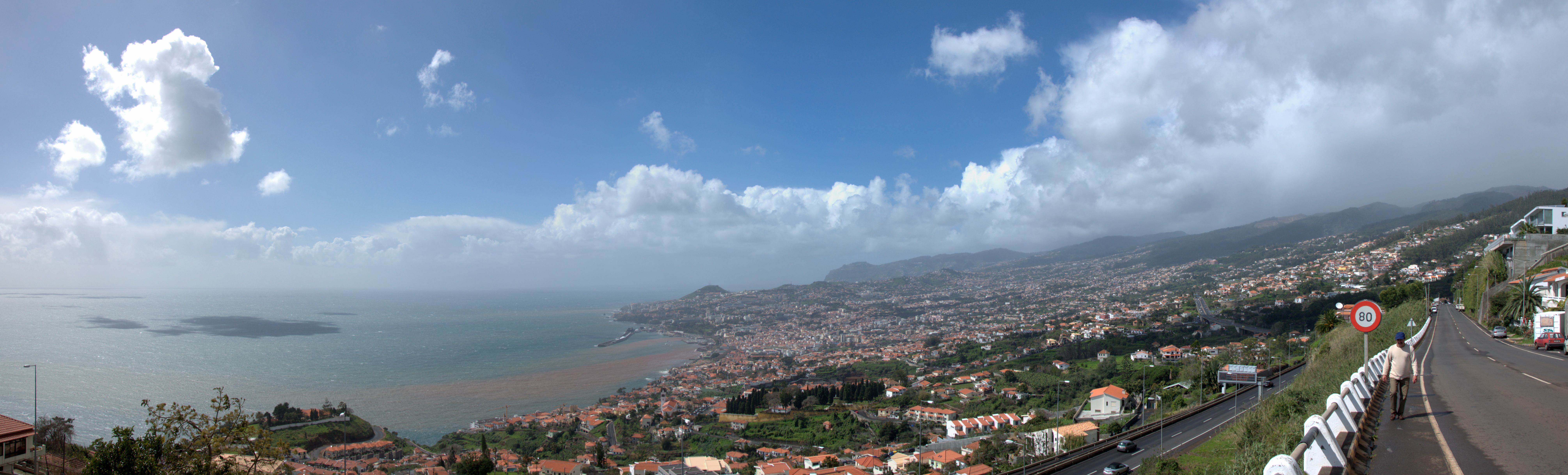 Portugal, Funchal